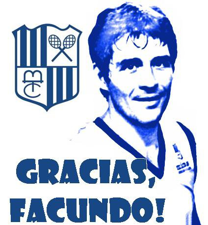 Facundo Sucatzky, ídolo do Minas. Ultras da Arena